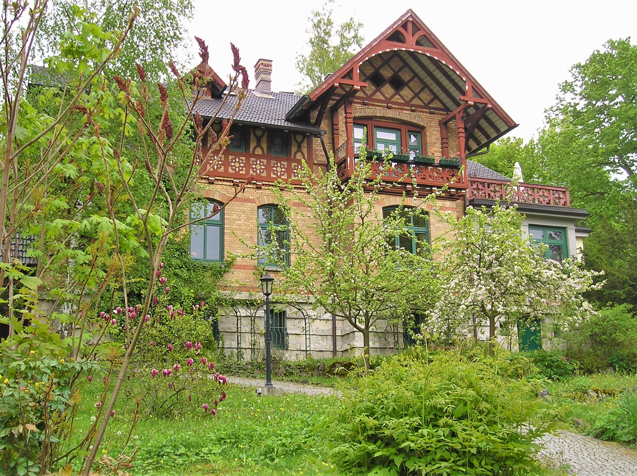 Villa des Architekten Eduard Fritze in Meiningen, Berliner Straße 39